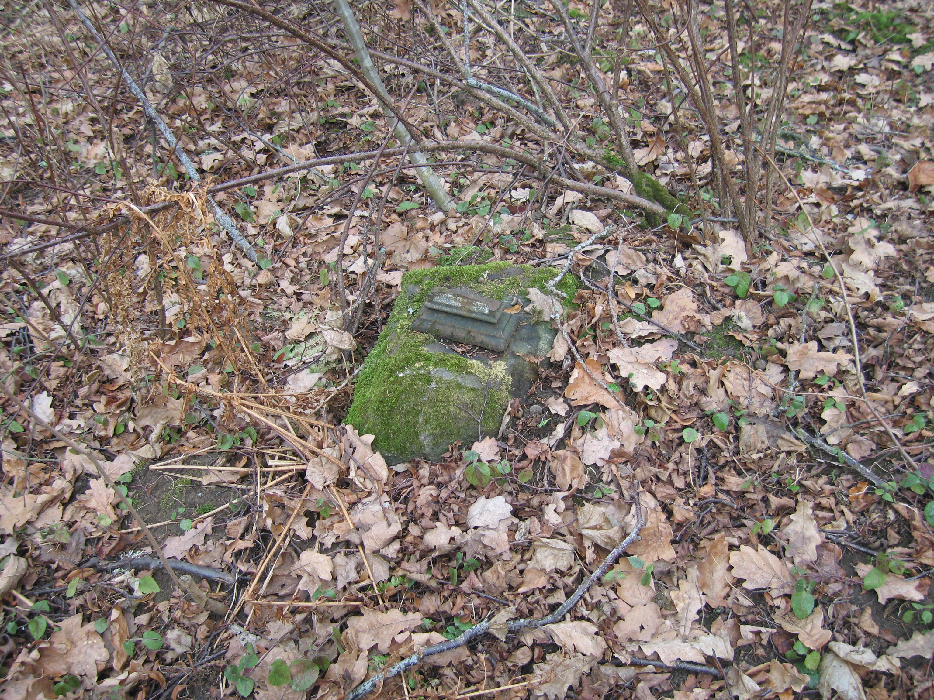 Hauaristi osa aluskivil